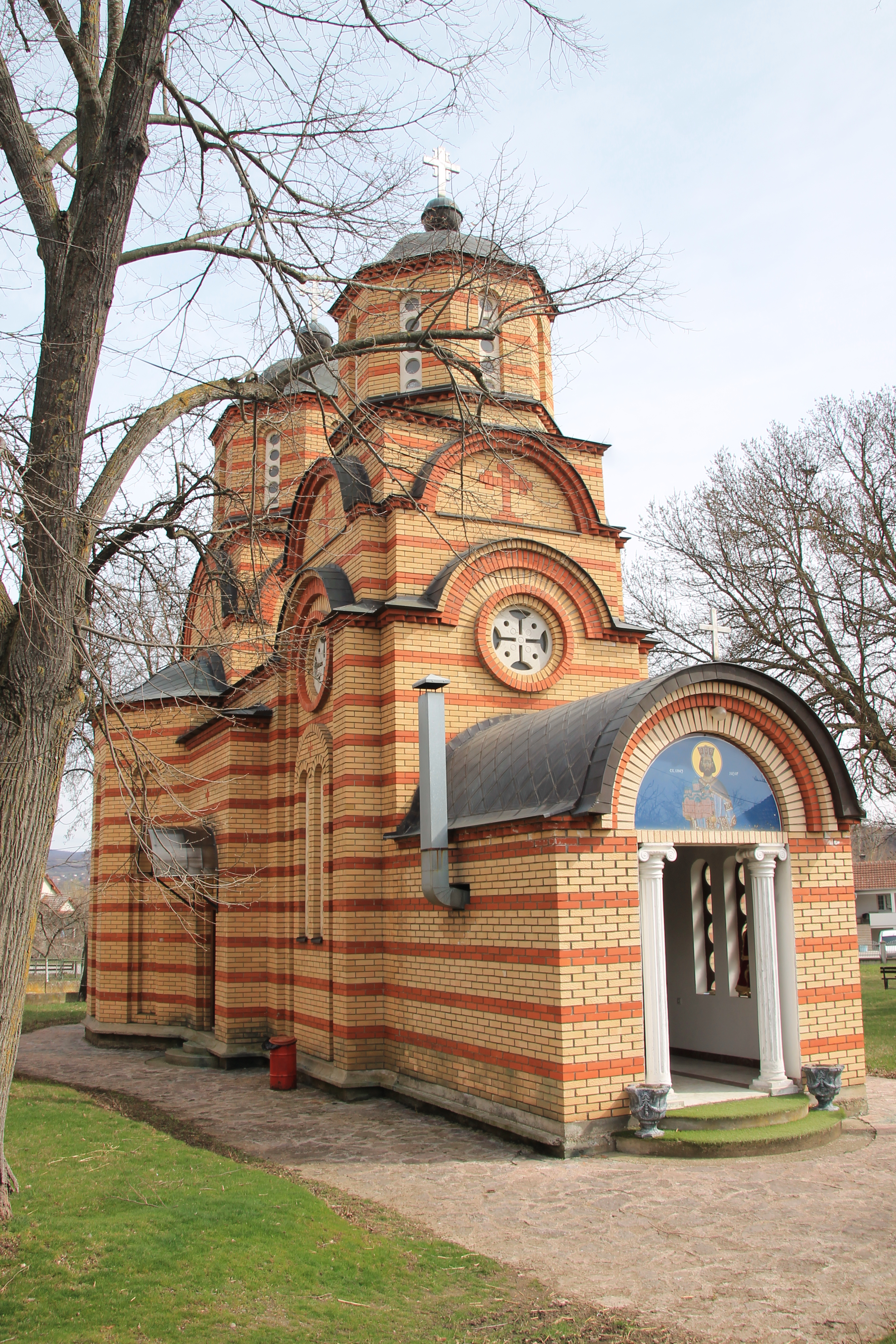 Crkva Sv. cara Lazara (Belušić)